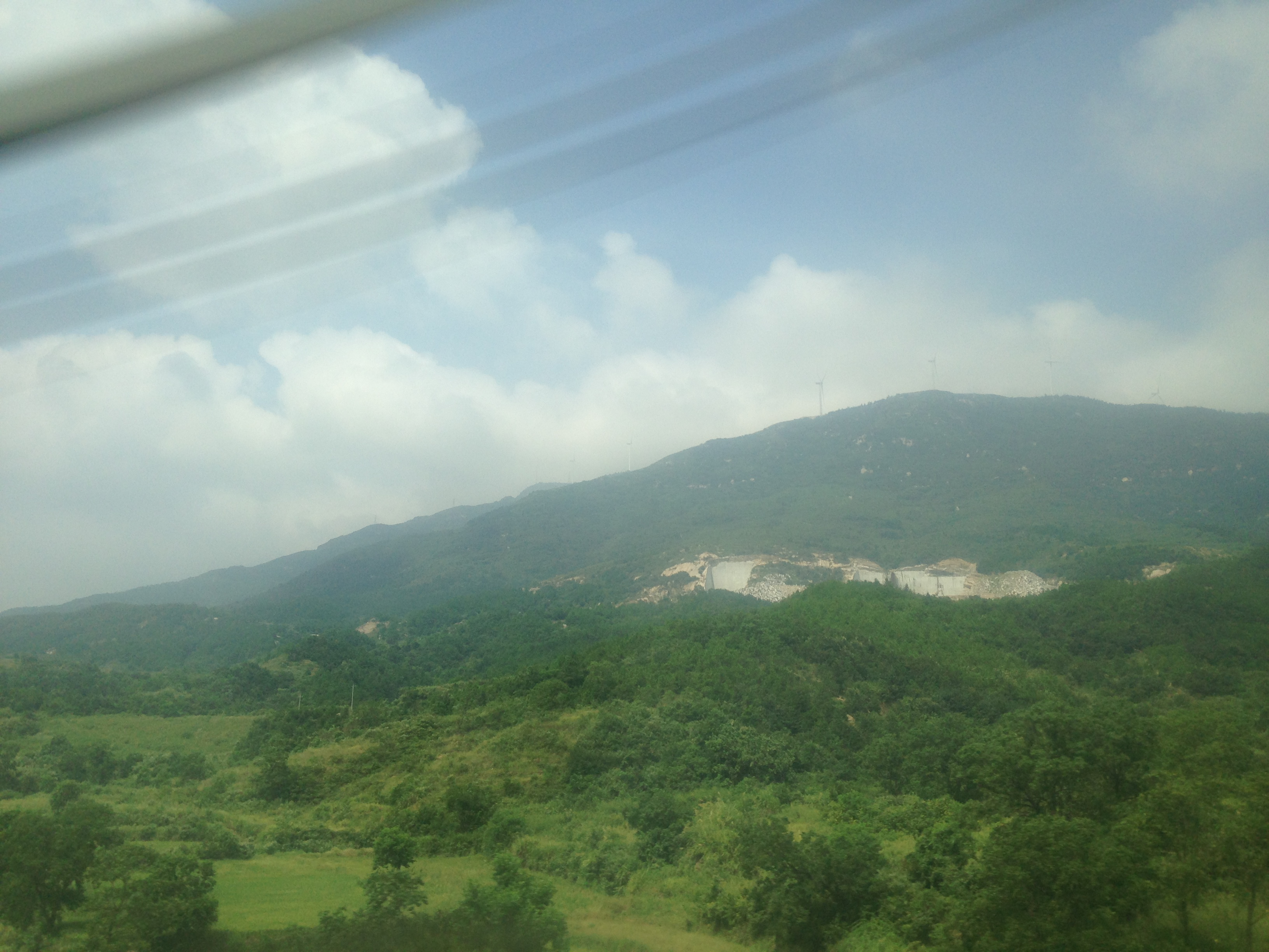 石武旅客専用線の列車内より望む孝感市大悟県夏店鎮付近の景色